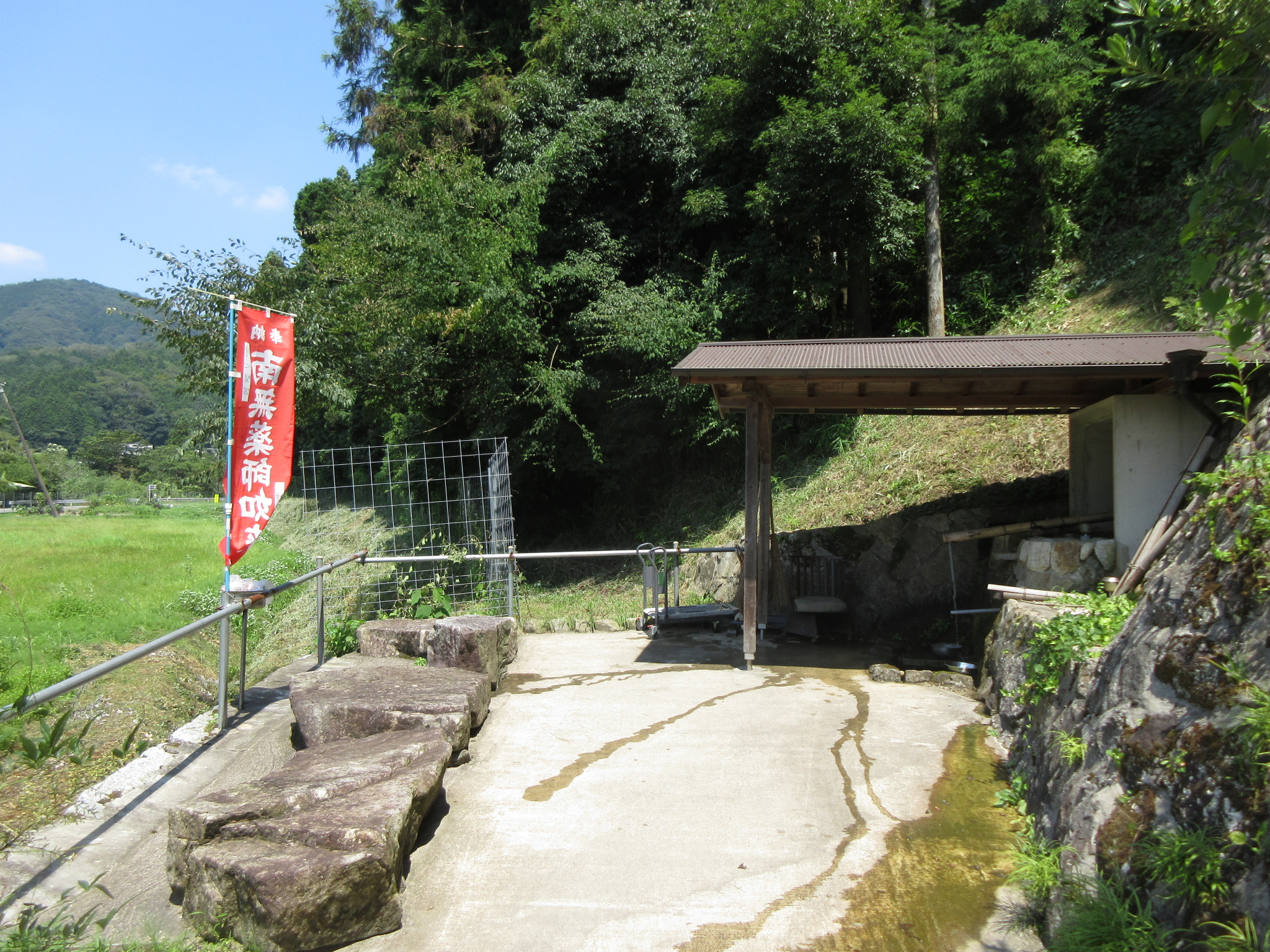 桜形細野霊水（岡崎市桜形町）